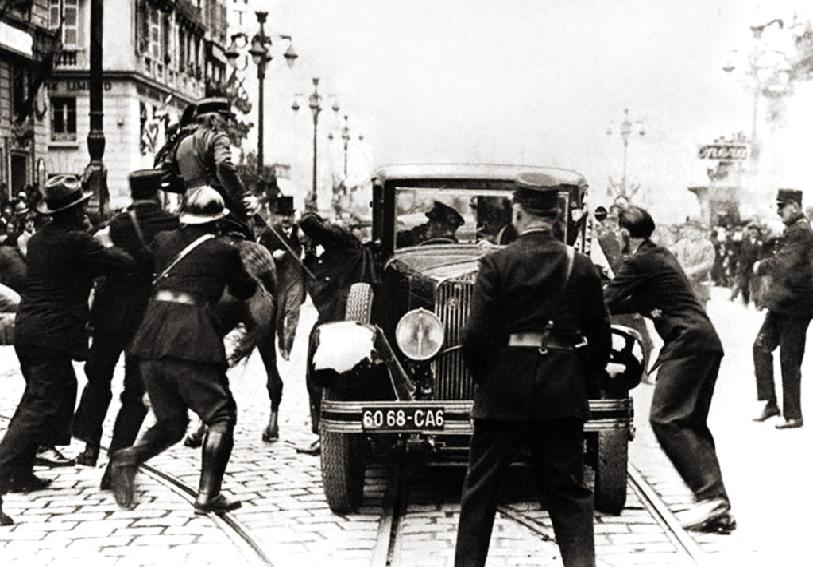 Марсејски атентат (1939)